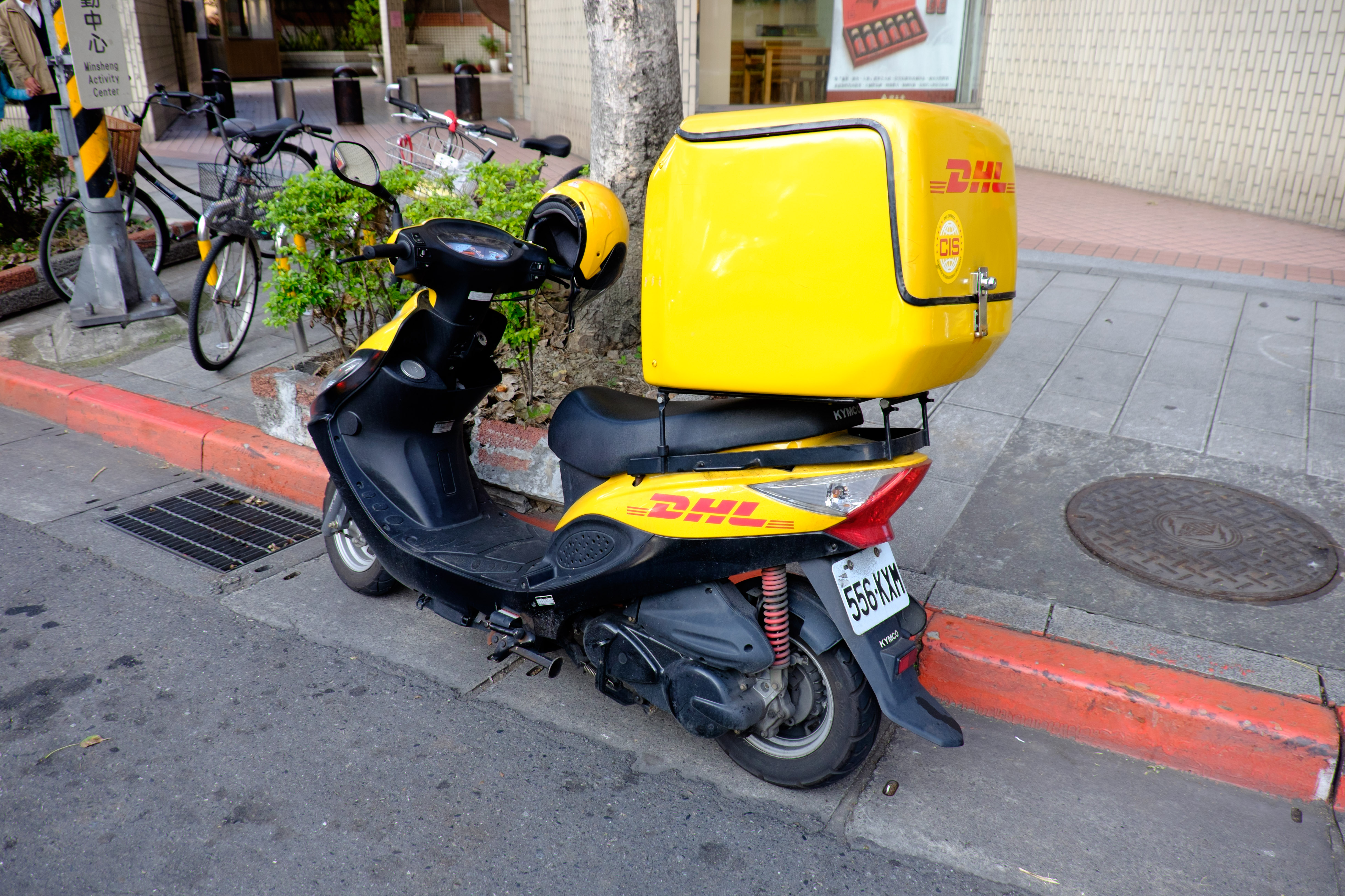 臺北市松山區民生東路五段海華花園廣場大樓前停放的洋基通運光陽快遞機車556-KXM。